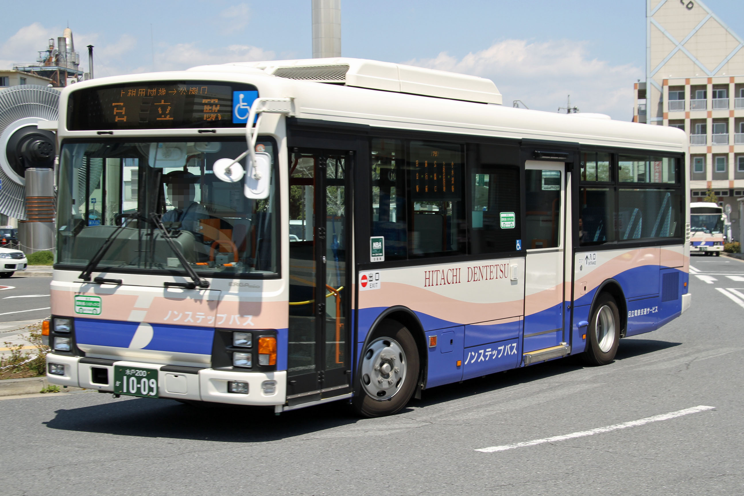 Hitachi Dentetsu Traffic Service car 日立電鉄交通サービスの車両